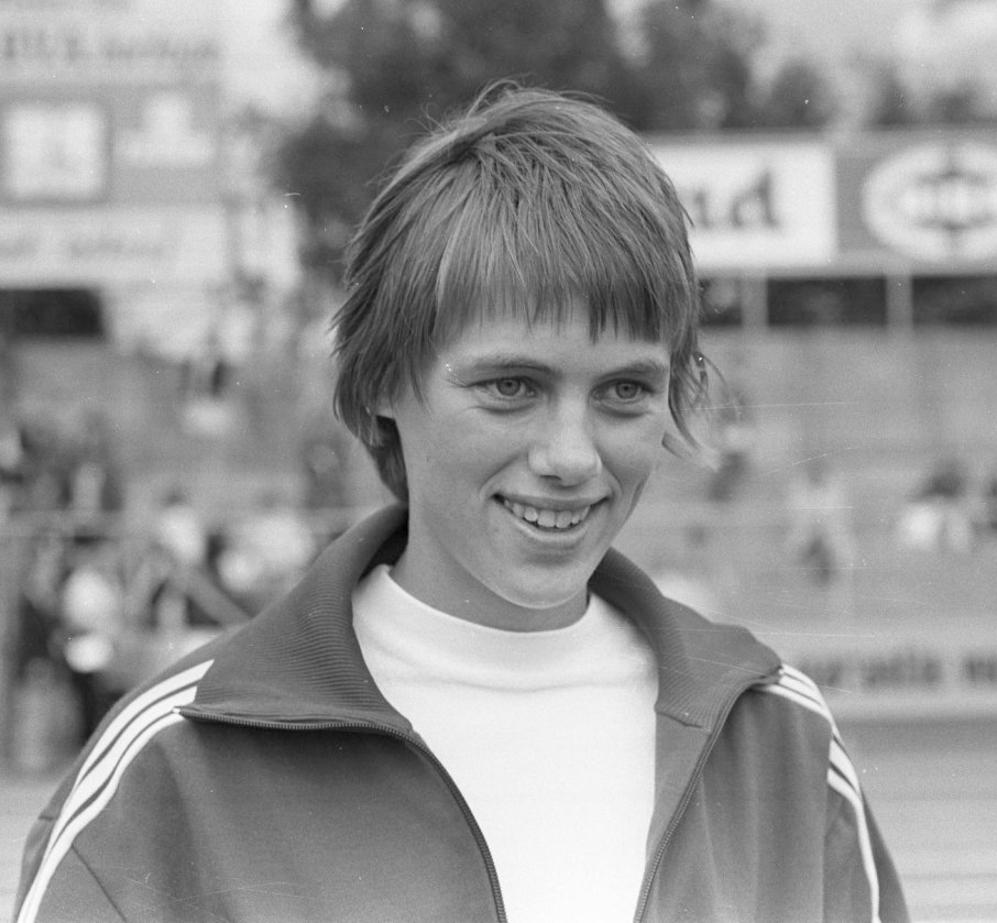 Nationale Atletiekkampioenschappen te Kerkrade, Ria Ahlers.